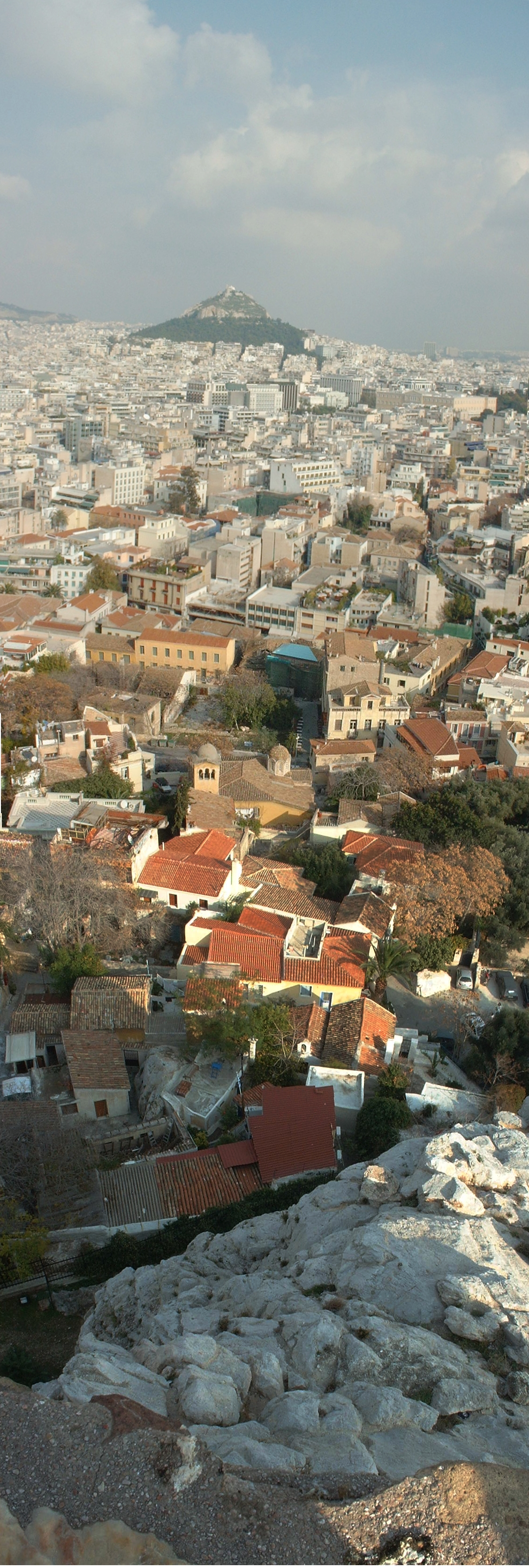 Panorama vertical athenes vue depuis l'acropole.